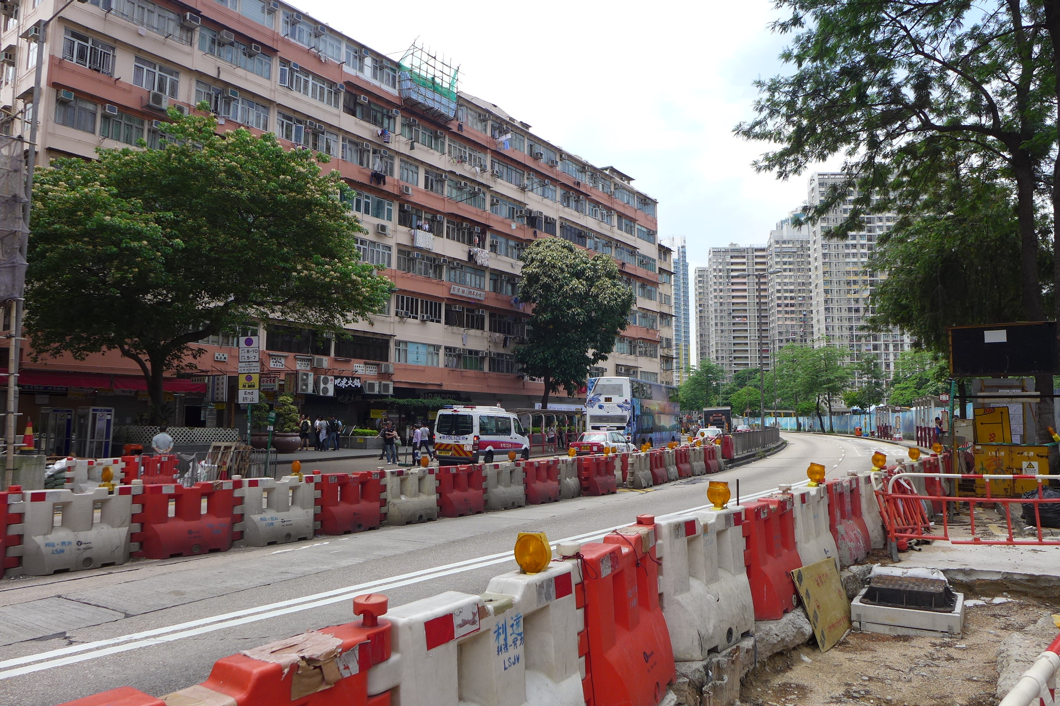 Choi Hung Road